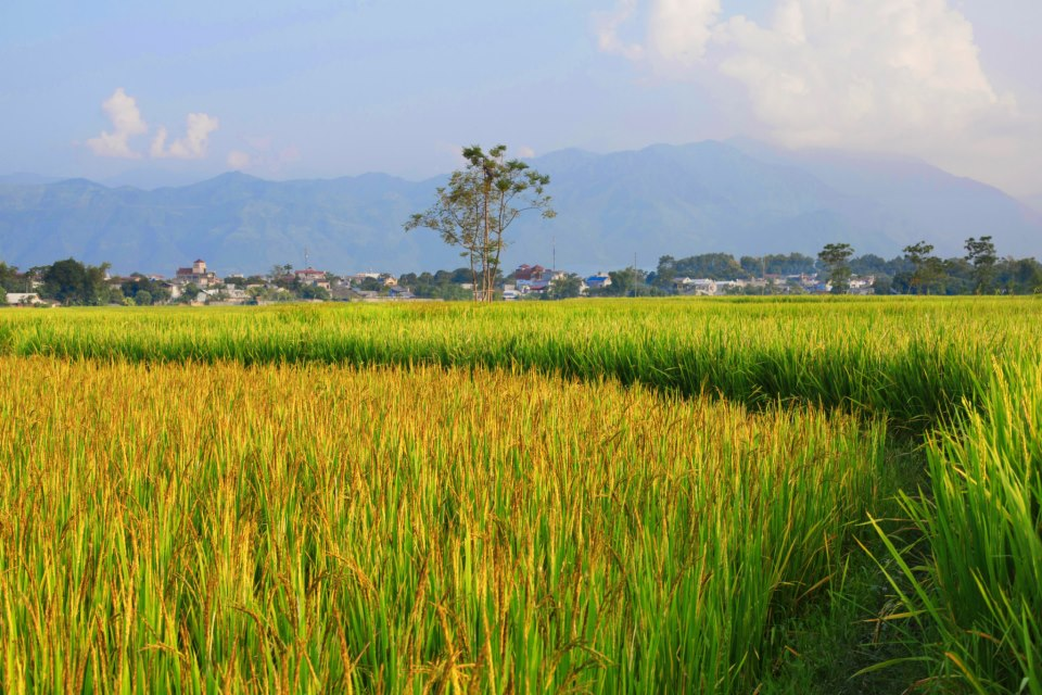 Cánh đồng Mường Lò - Nghĩa Lộ 2012 Copyright by Saokim999